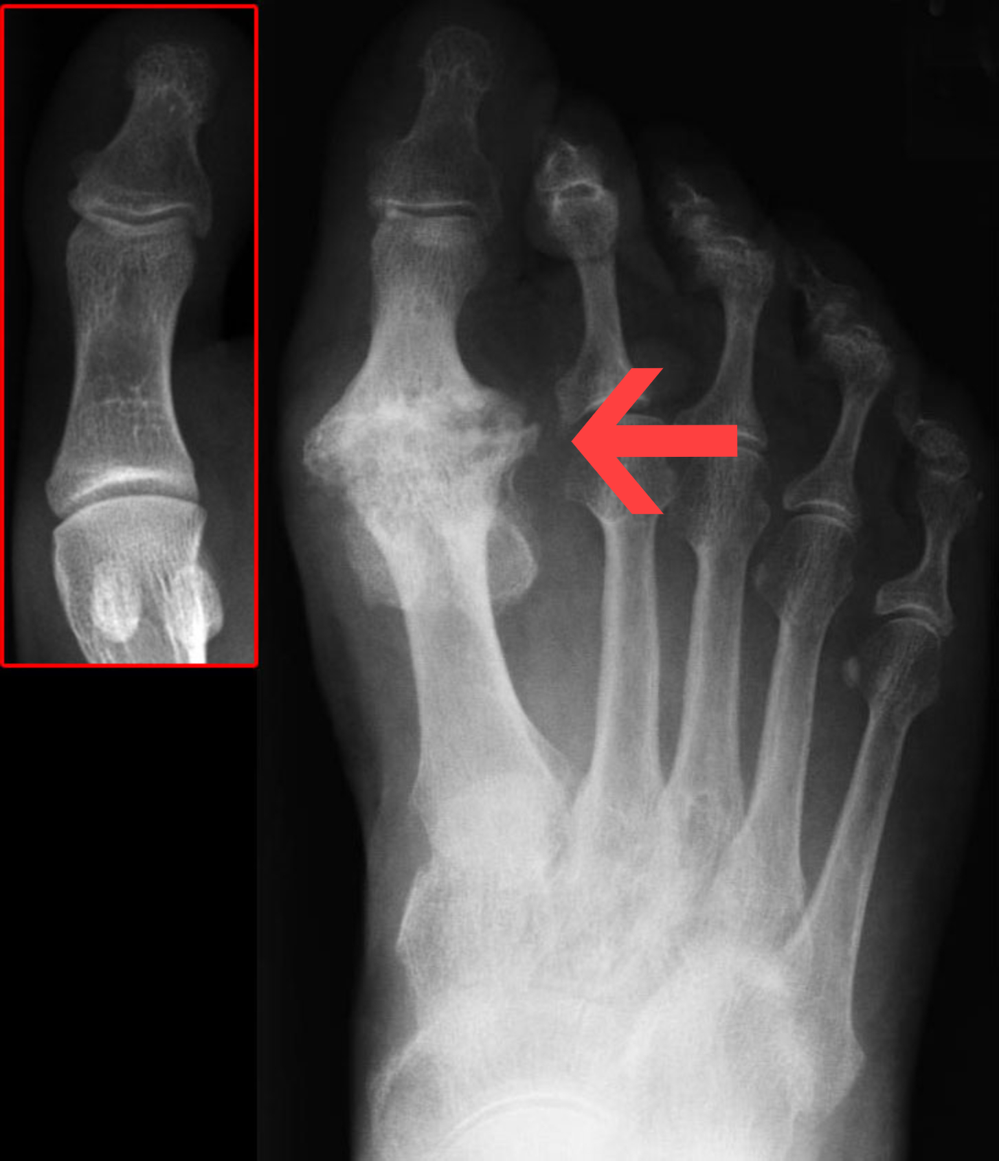 Hallux rigidus durch Arthrose im Grundgelenk der Großzehe. Das Bild links im roten Kasten zeigt normale Verhältnisse.